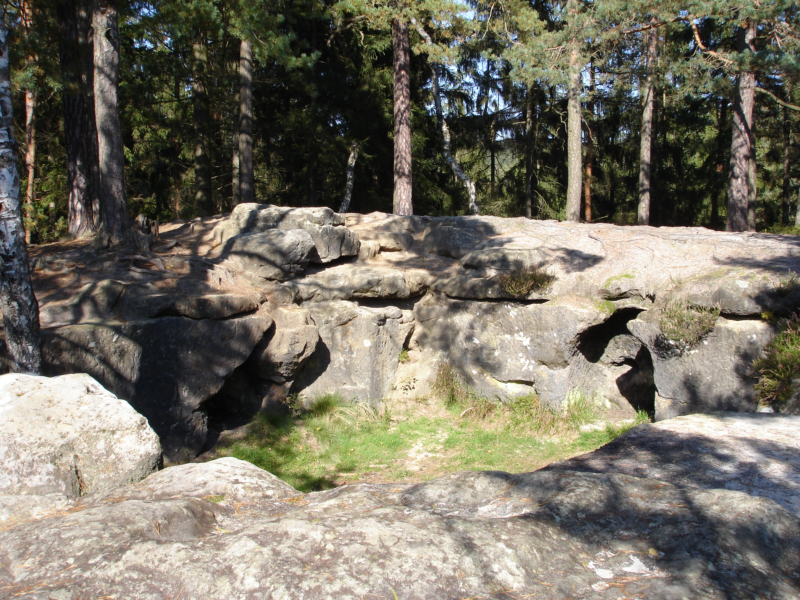 Chřibský hrádek (Unterer Karlstein) bei Chřibská, Böhmische Schweiz